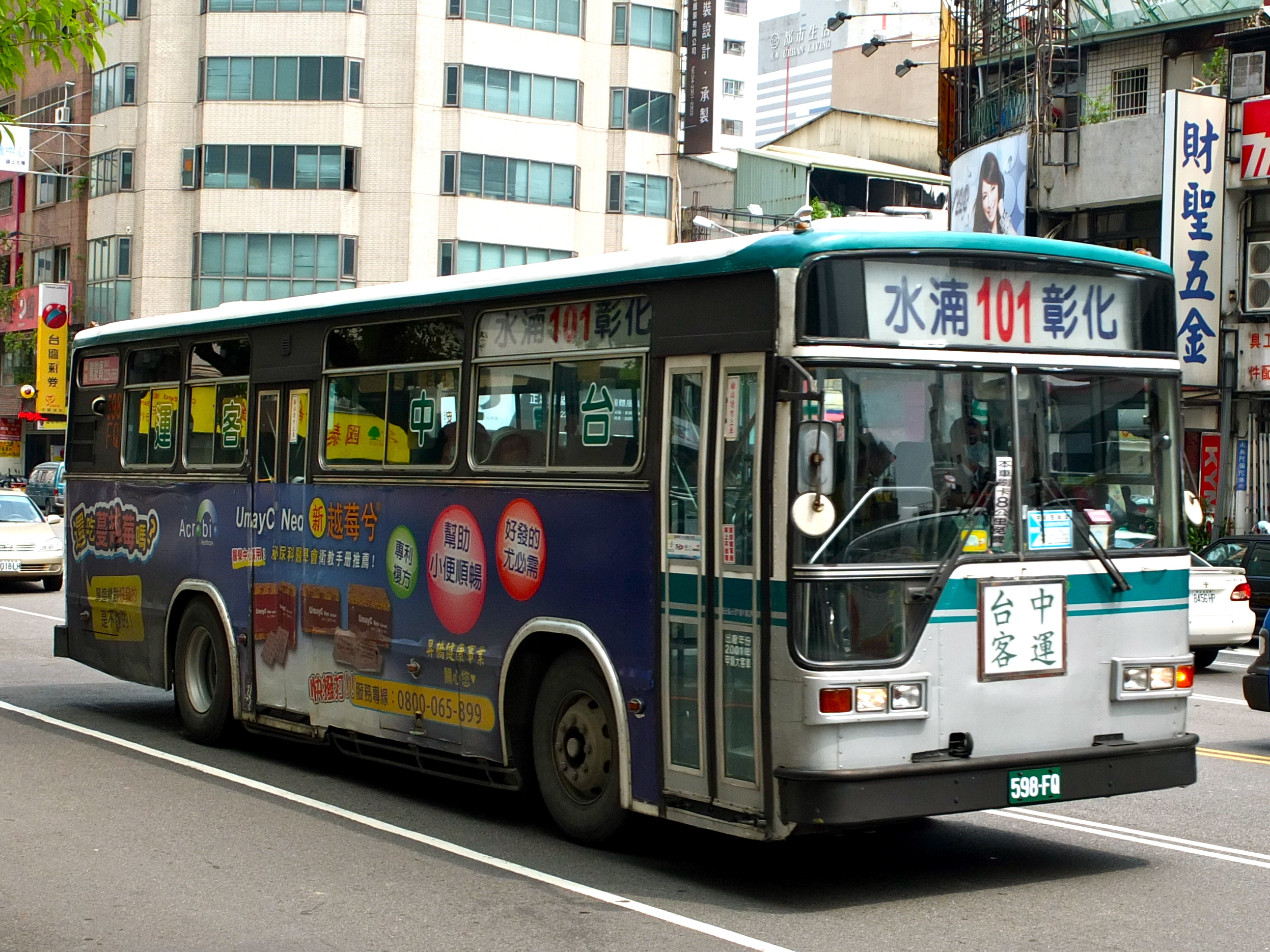 台中客運 598-FQ 營運台中市公車 101 路，行駛於台中市民權路。本車為 HINO ERK2JM 日盈車體，原台北客運車輛。